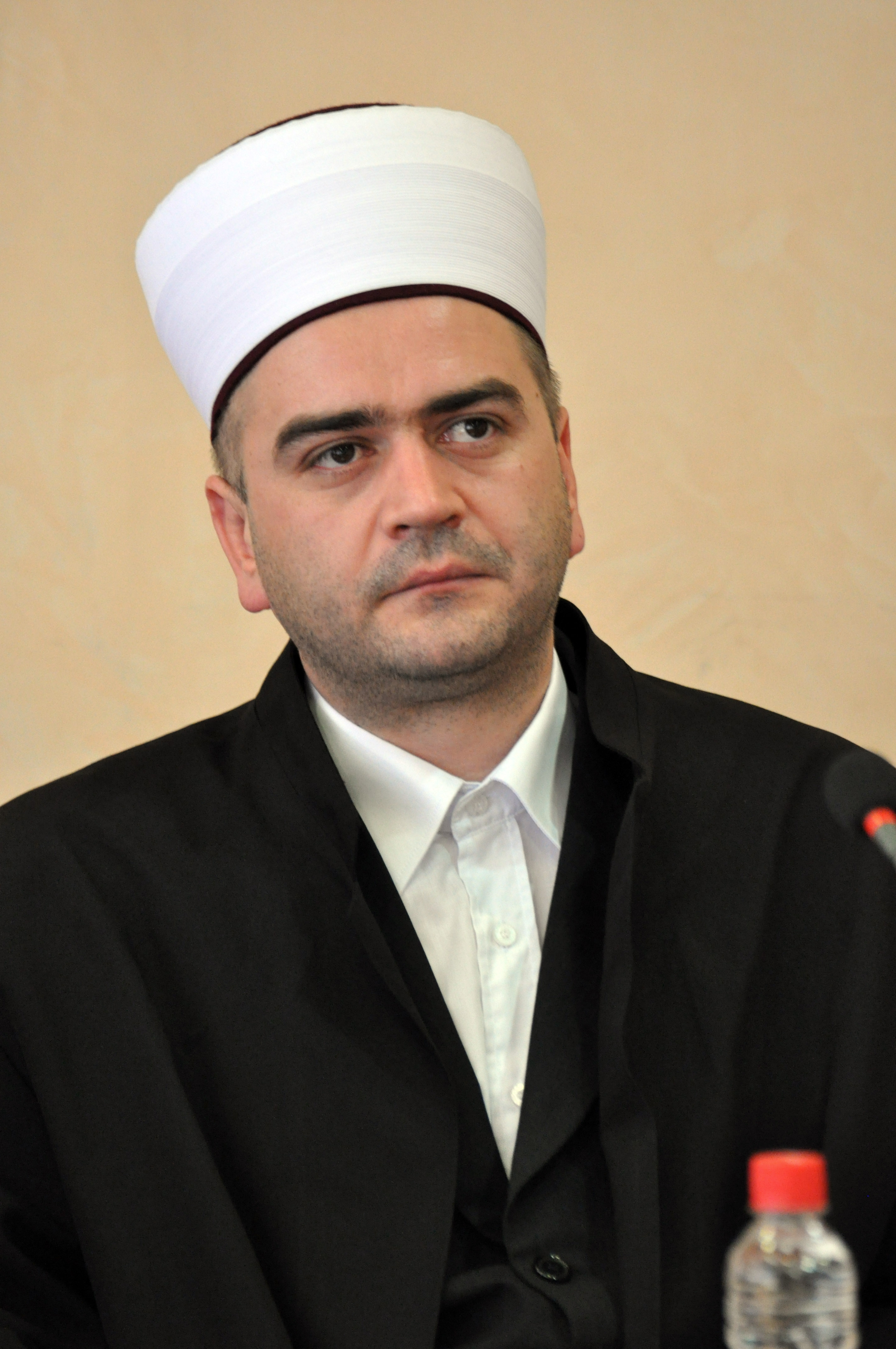 Sead Nasufović, Medija centar Beograd